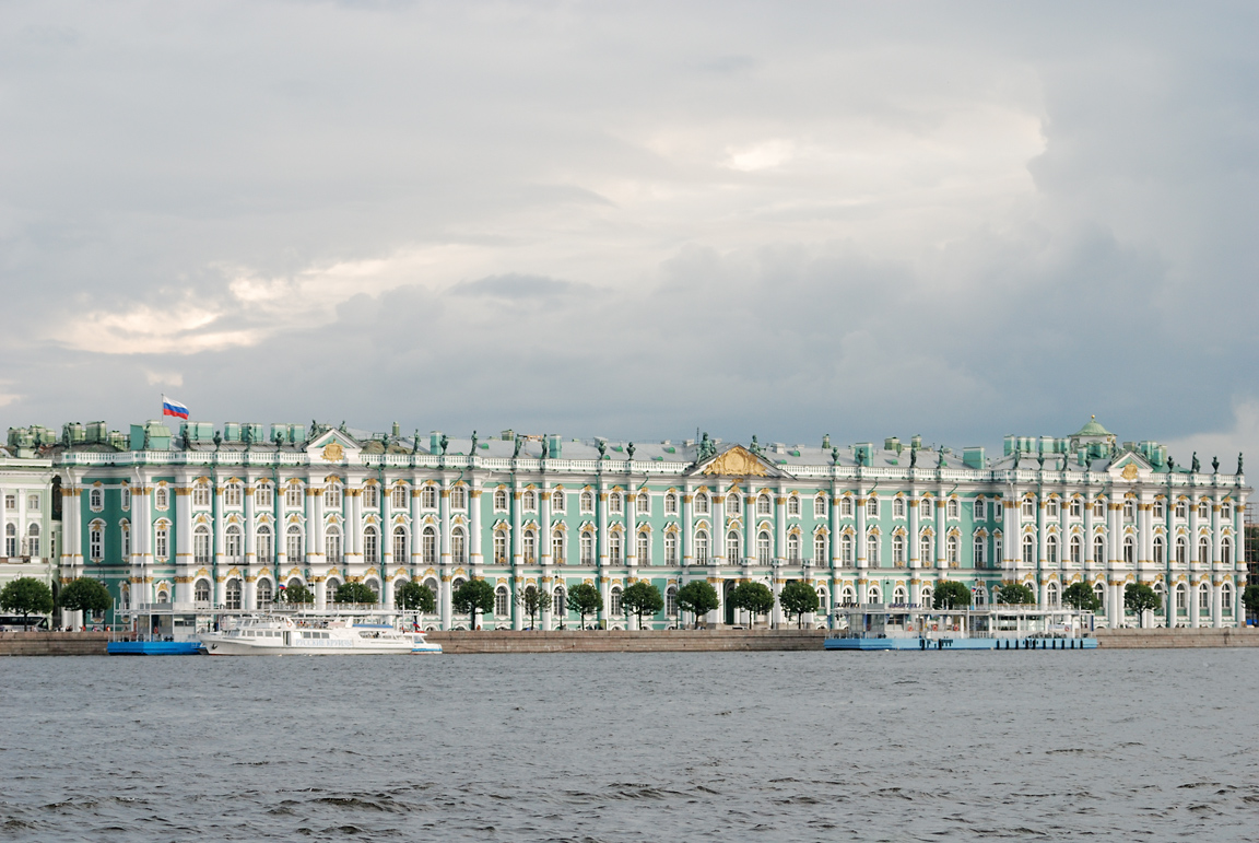 Palác Ermitáž v Petrohradě